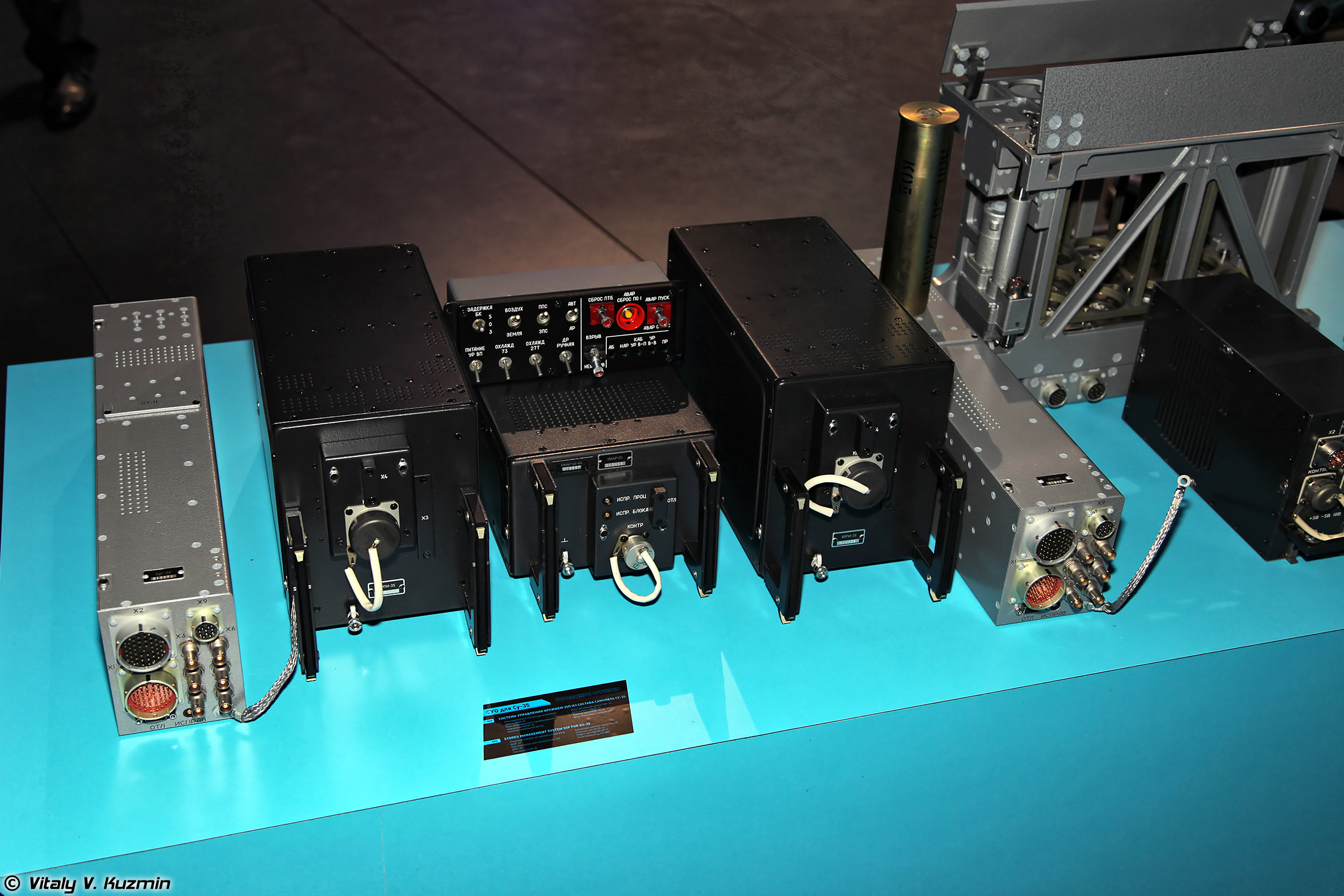 Система управления оружием 35-П для Су-35 (Su-35 armament control system 35-P)